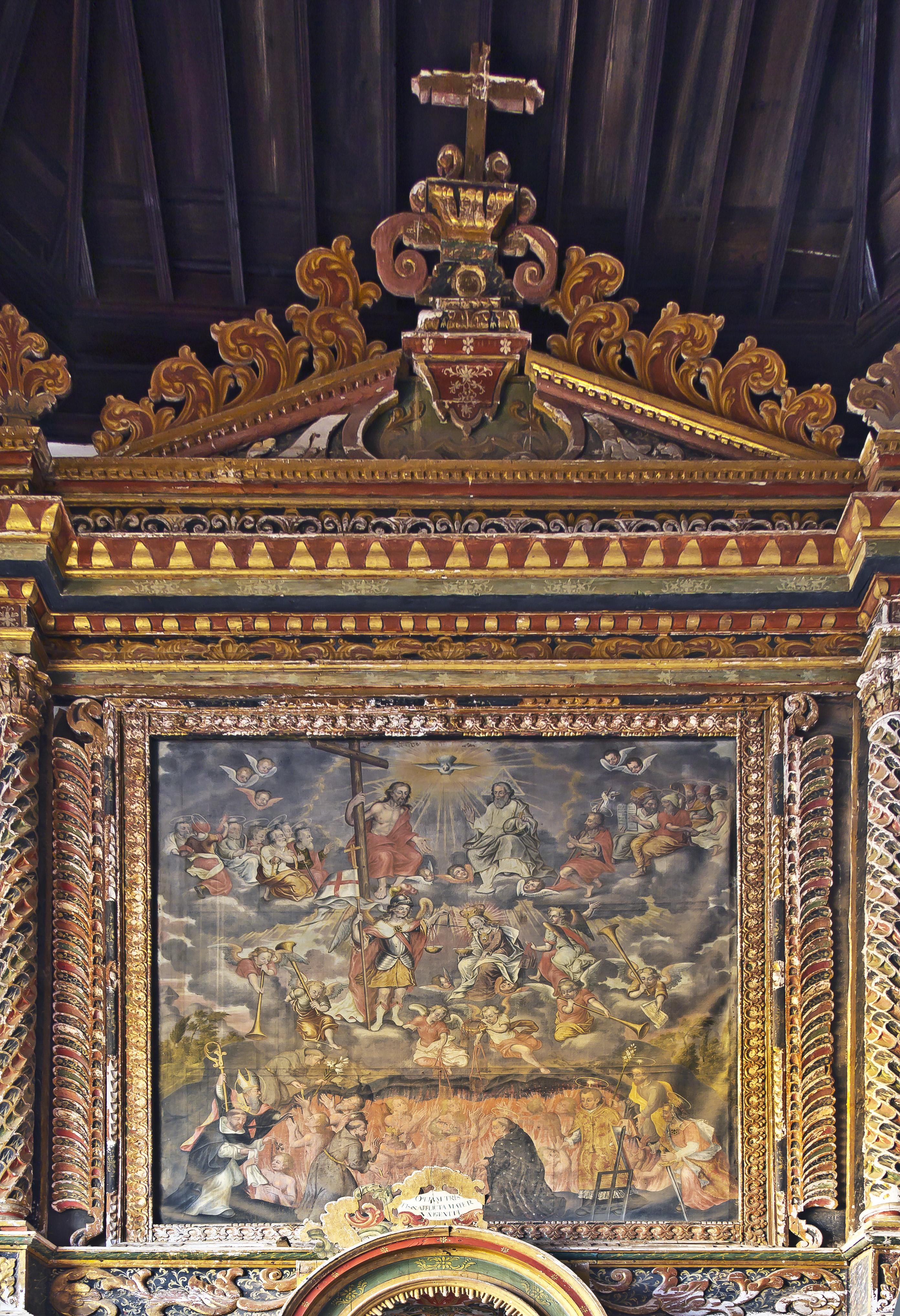 Oberer Teil des Altars der Seelen (Retablo de animas) im nörtlichen Seitenschiff der Kirche Santa Catalina in Tacoronte